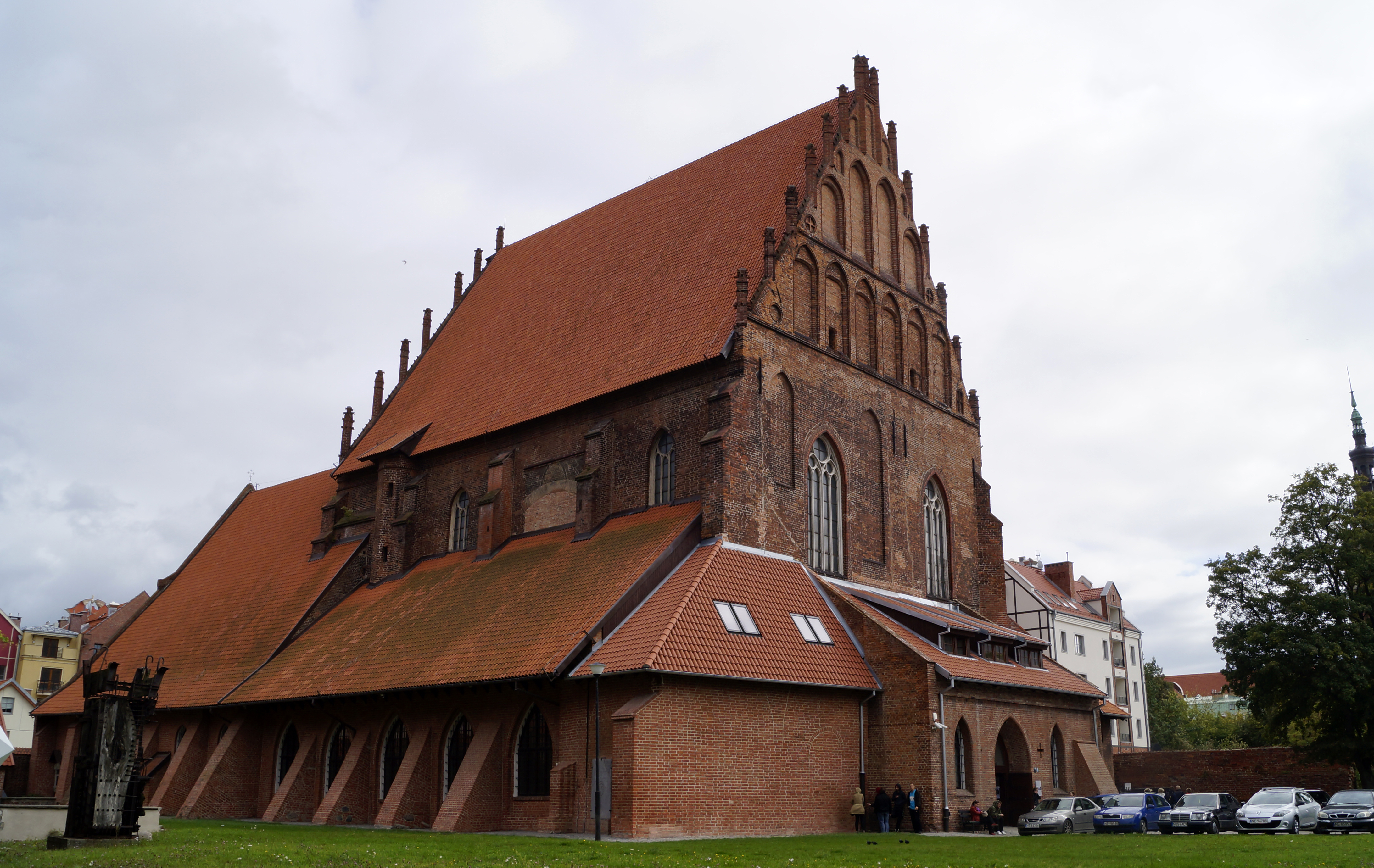 Elbląg, kościół p.w. NMP, ob. galeria sztuki EL, 2 poł. XIII, XIV, 1976-1982